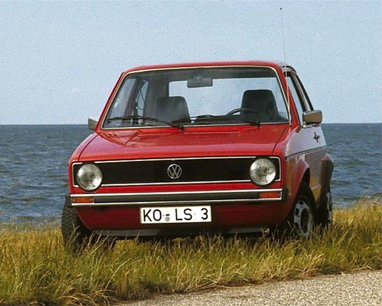 VW Golf LS, Baujahr 1974 (mit tatsächlichem Kennzeichen) am Ijsselmeer in Holland, Fahrzeugeigner: Lothar Spurzem